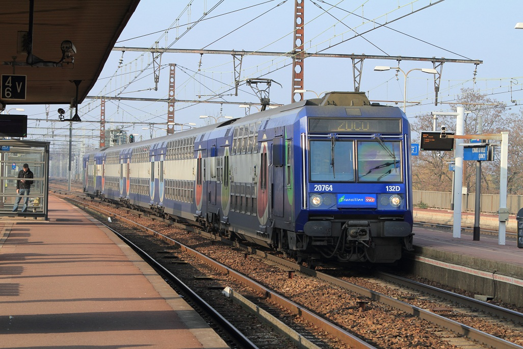 La Z 20763/64 en direction de Melun entre en gare de Combs-la-Ville - Quincy en janvier 2011, Seine-et-Marne, France.